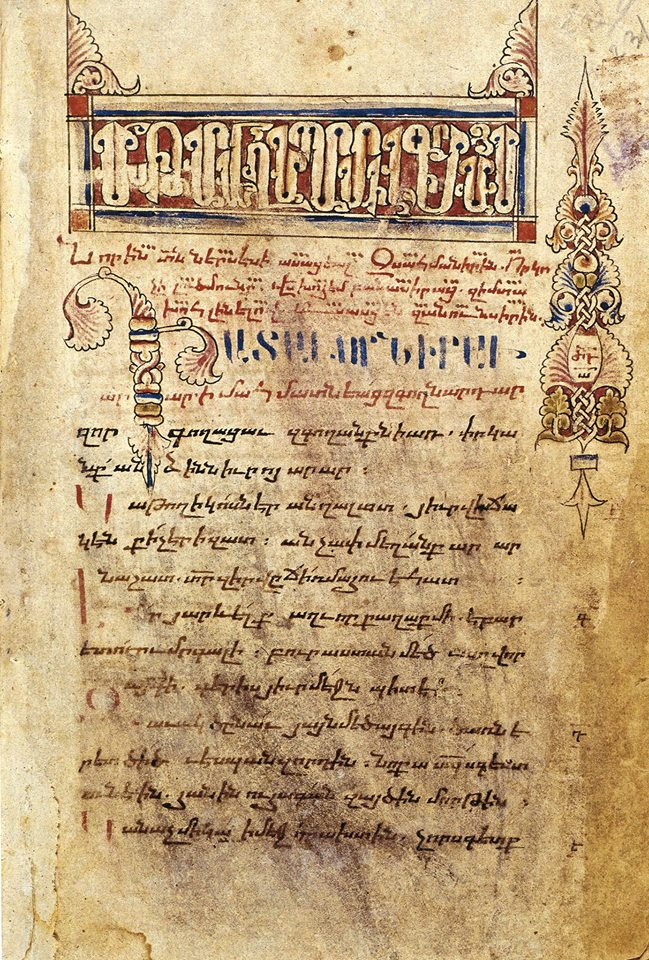 Երեւանի մատենադարան, ձեռ. թիւ 2961, թ. 39v